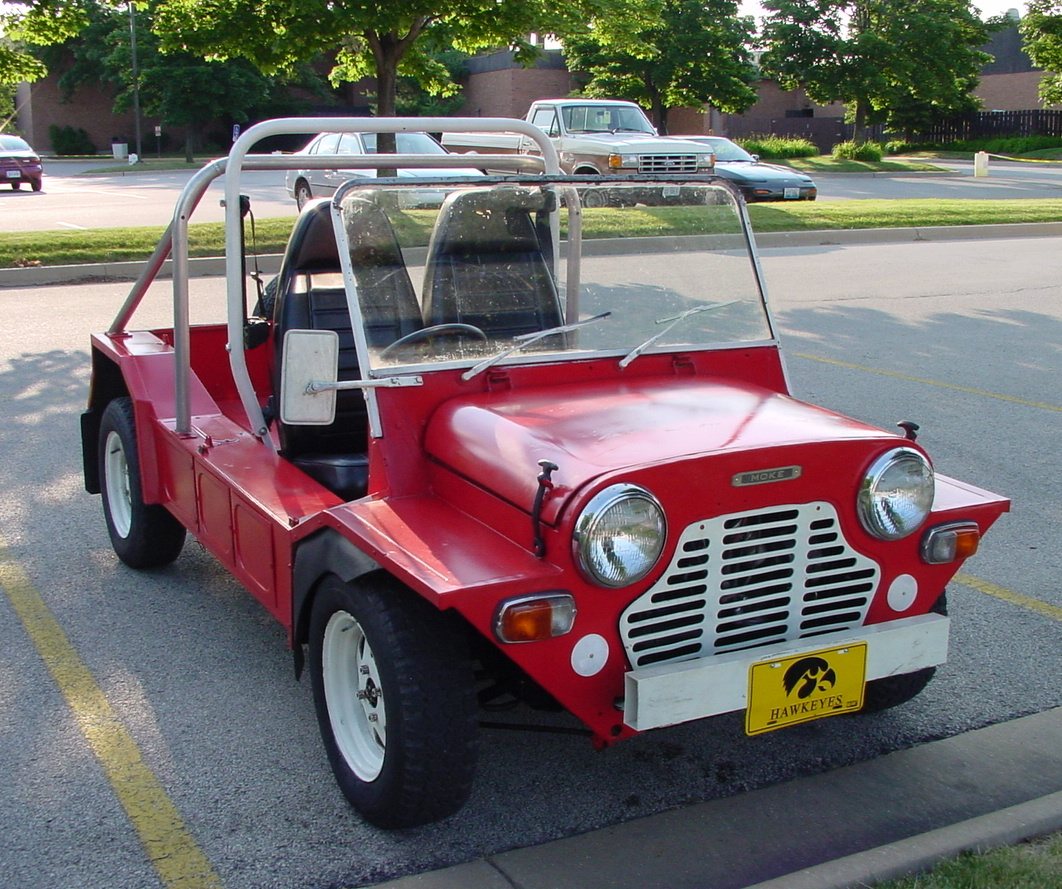 An Australian made Mini Moke.